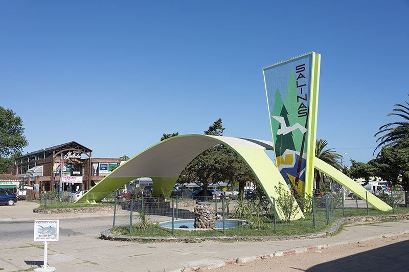 Entrada al Balneario Salinas a la Avenida Julieta